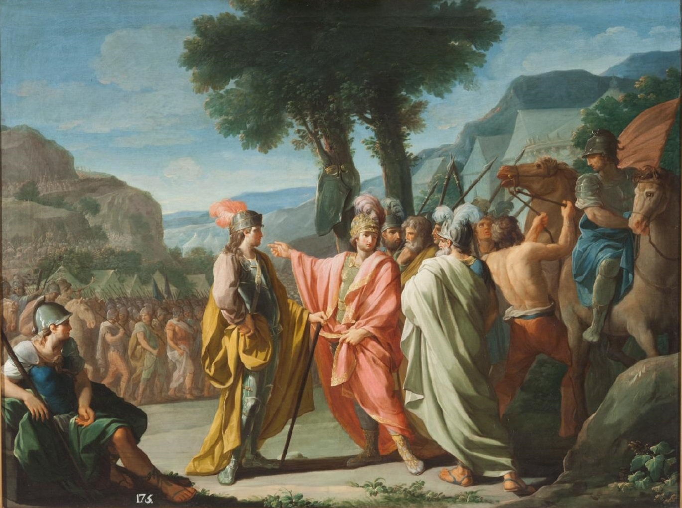 La obra representa al general cartaginés Aníbal y a su ejército en los Alpes.